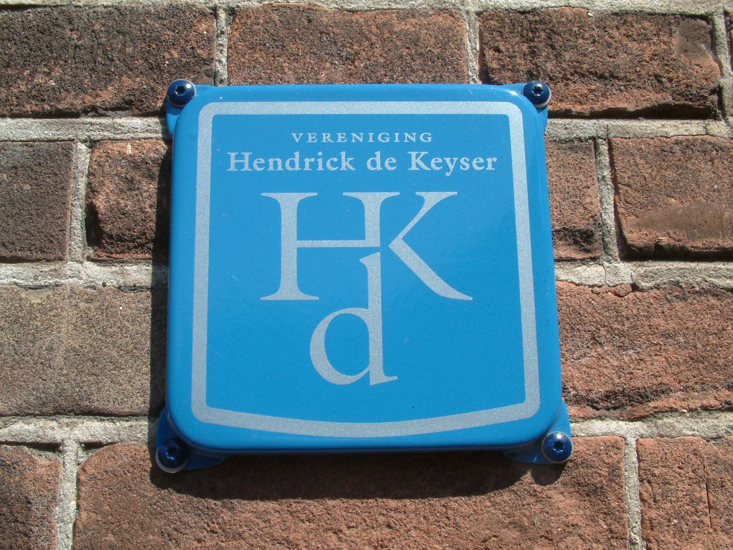 Watertowers in Schoonhoven